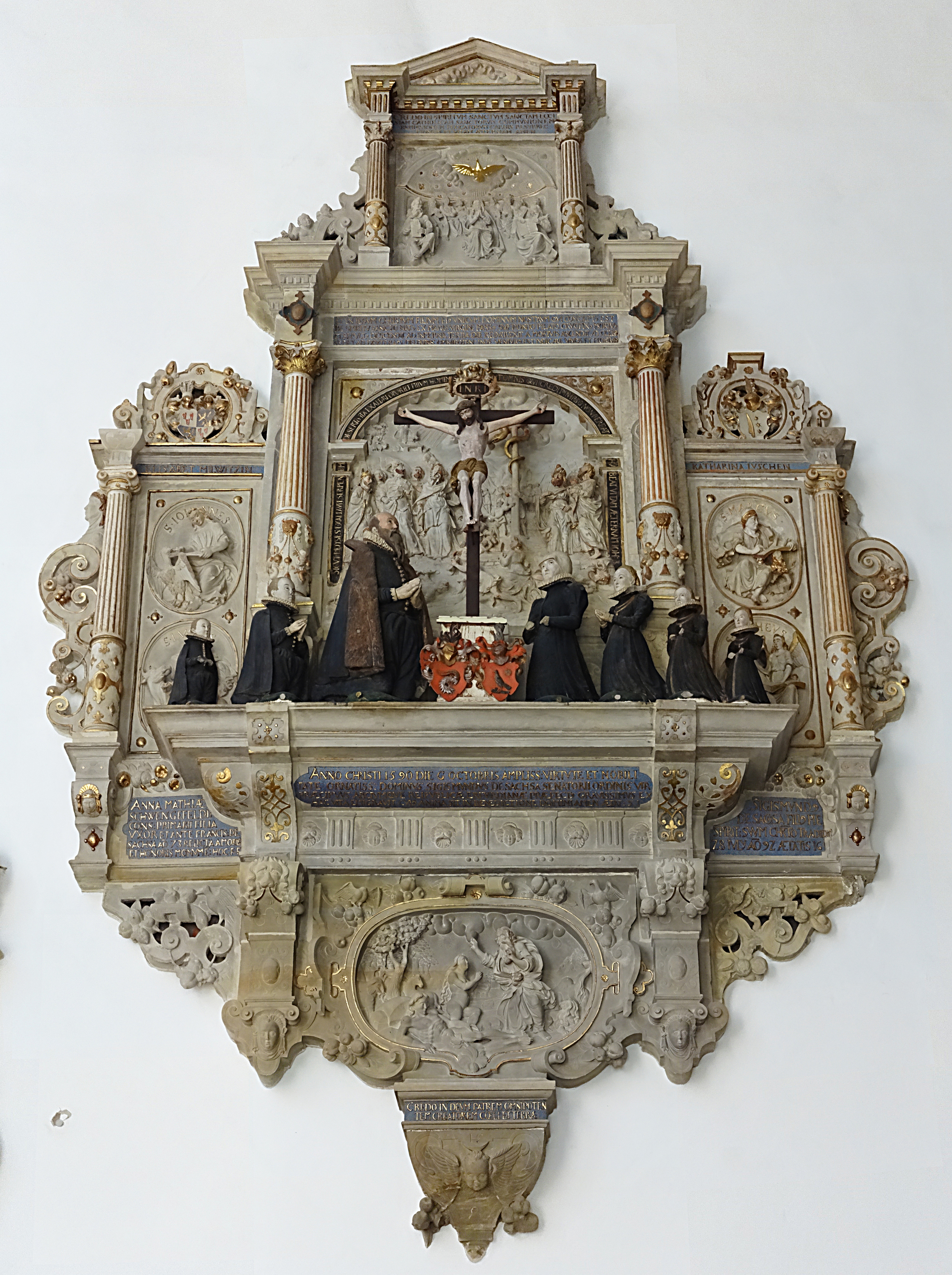 Epitaph der Familie des Sigismund von der Sachsen († 1590) in der Kaufmannskirche (Erfurt) aus der Werkstatt Fridemann (vor 1594)[1]